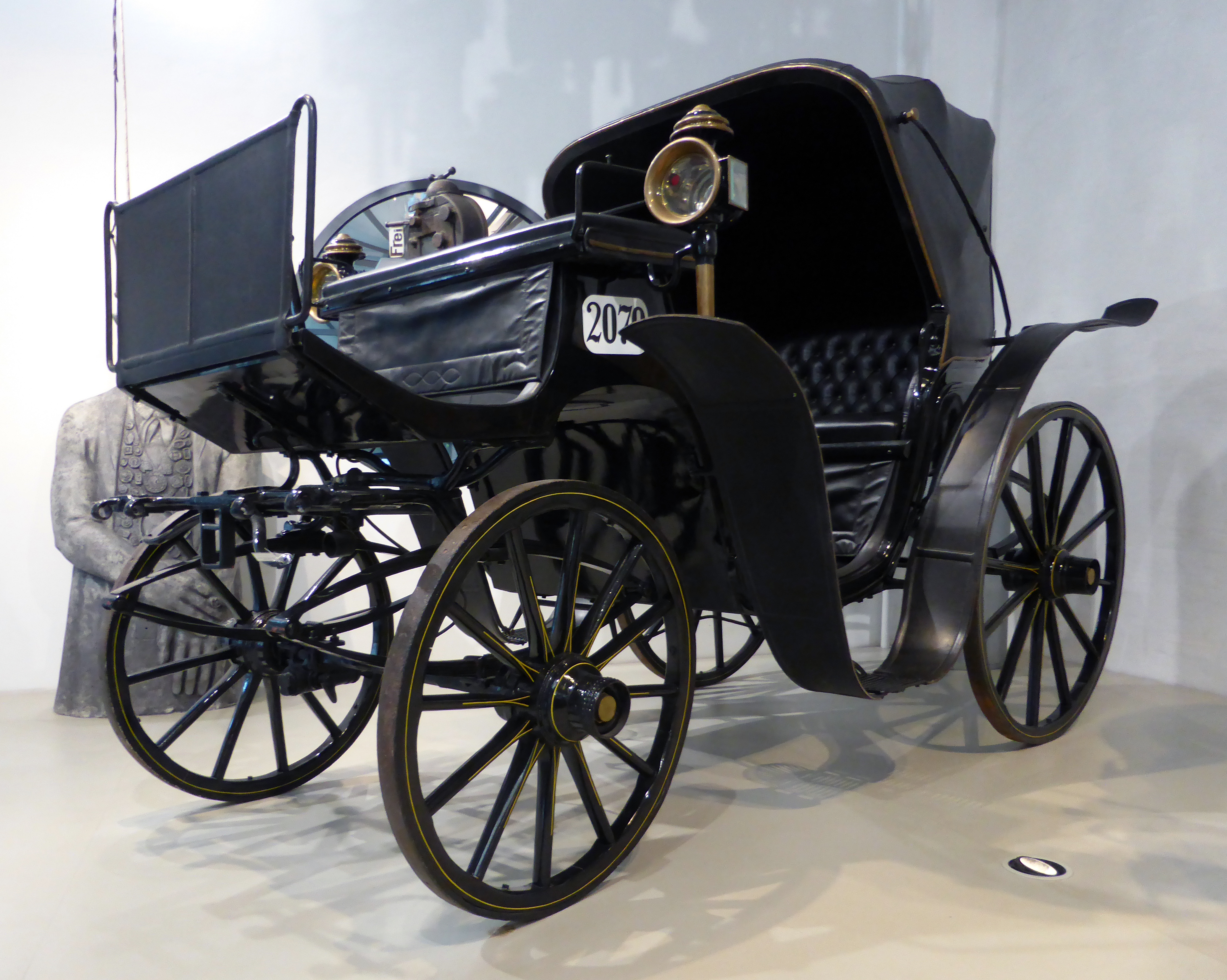 Landaulet-Kutsche, Baujahr 1898. Ausgestellt im Deutschen Technikmuseum in Berlin. Wikipedianische KulTour am 10. Oktober 2015 in der Ausstellung des Museums.